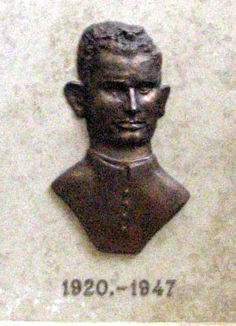 Derivati of file Spomenik, Miroslav Bulesic.JPG